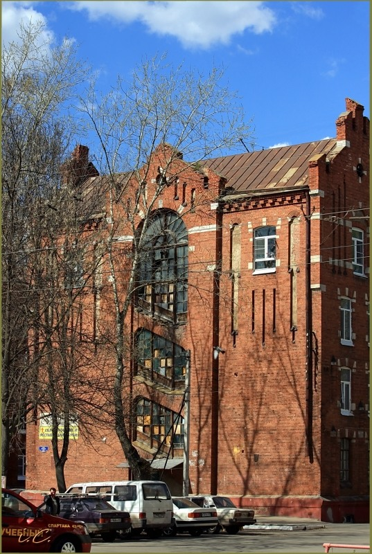 Тверь. Ул. Спартака, 43—45. Казармы Рождественской мануфактуры П. В. Берга. 1901—1905. Архитектор Карл Шмидт